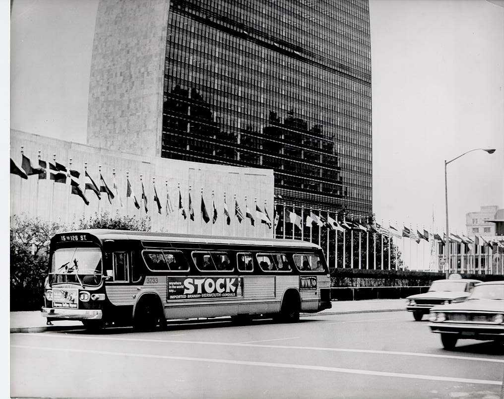 esempio di ricorso sistematico di marketing e pubblicità